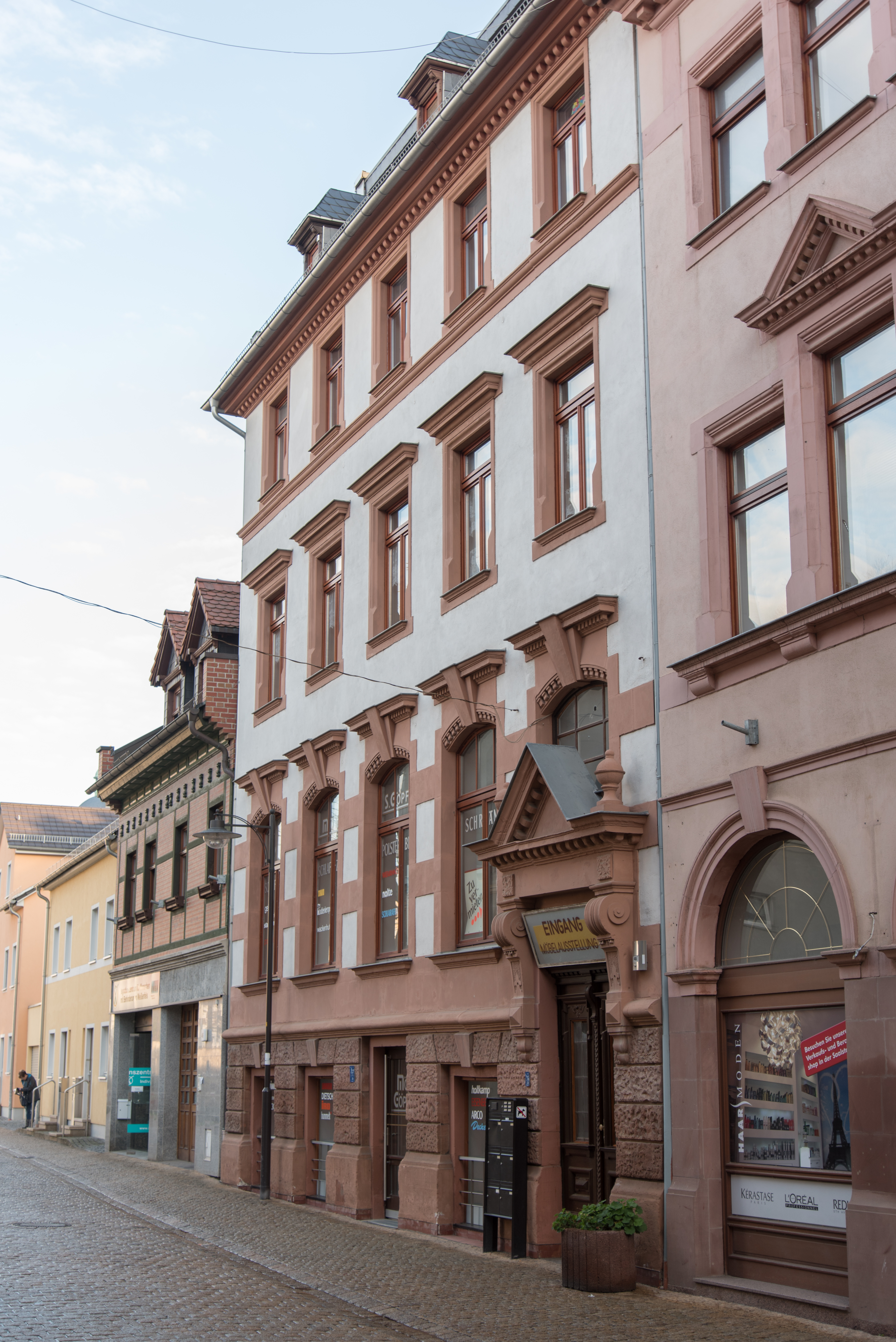 Weißenfels, Marienstraße 48